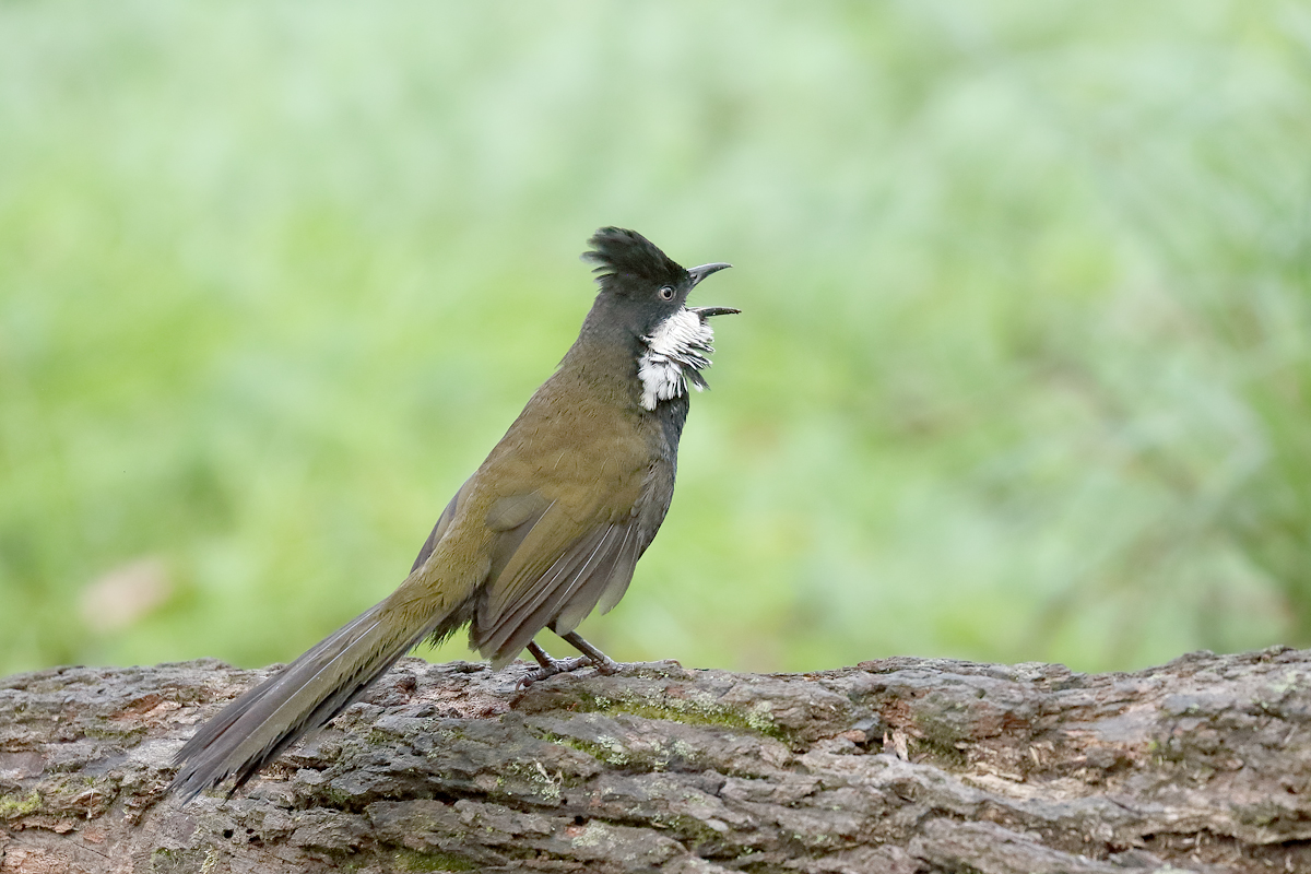 Warriewood wetlands, NSW